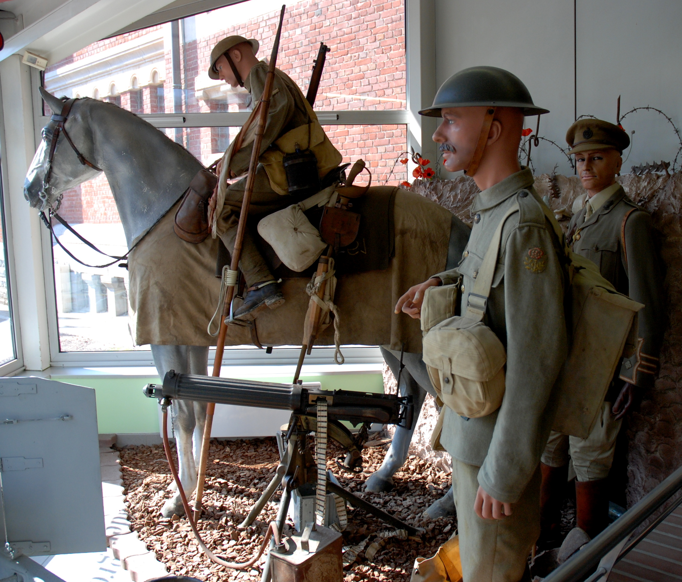 Inkomhal van het Museum Somme 1916 in Albert, Frankrijk